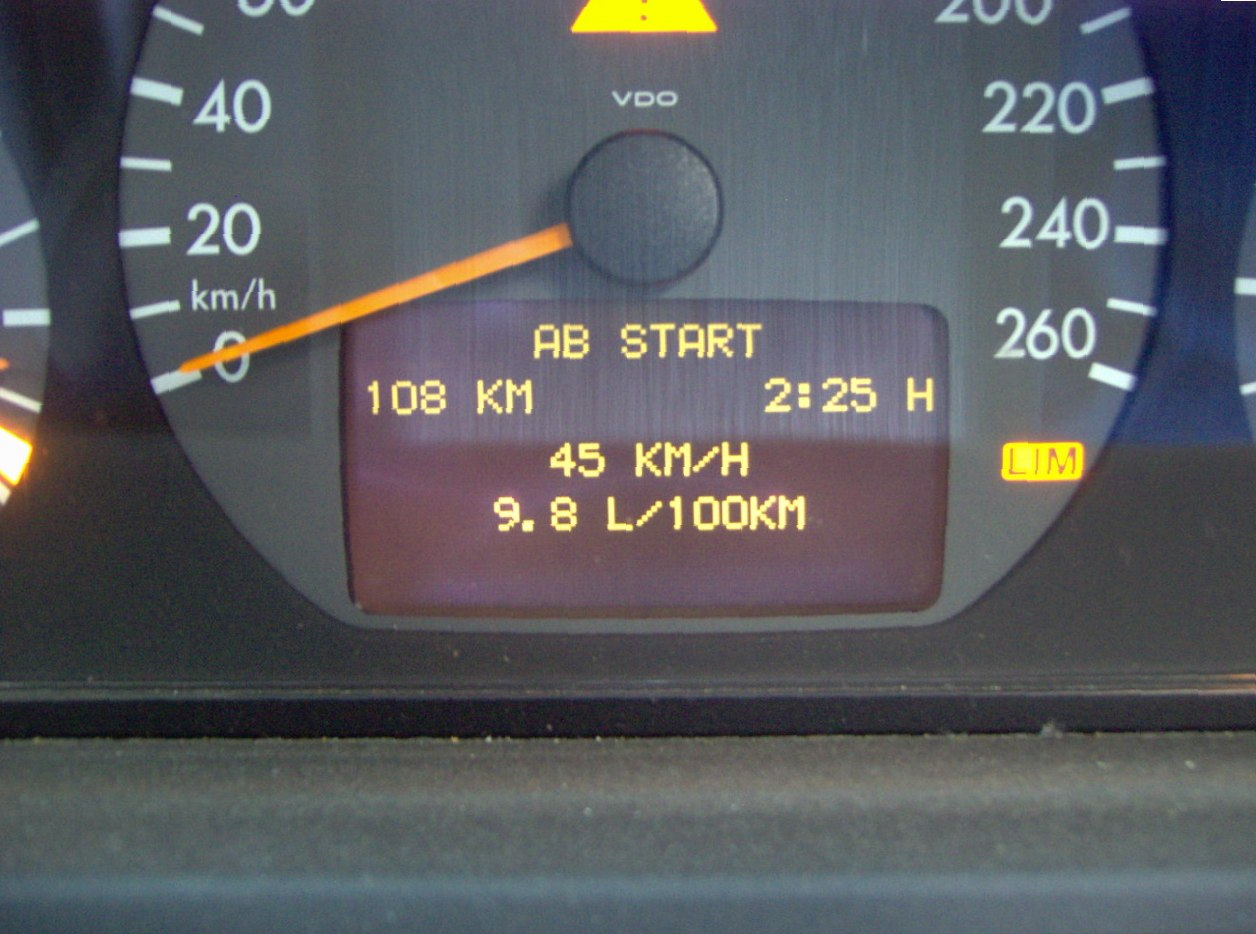 Tachometer